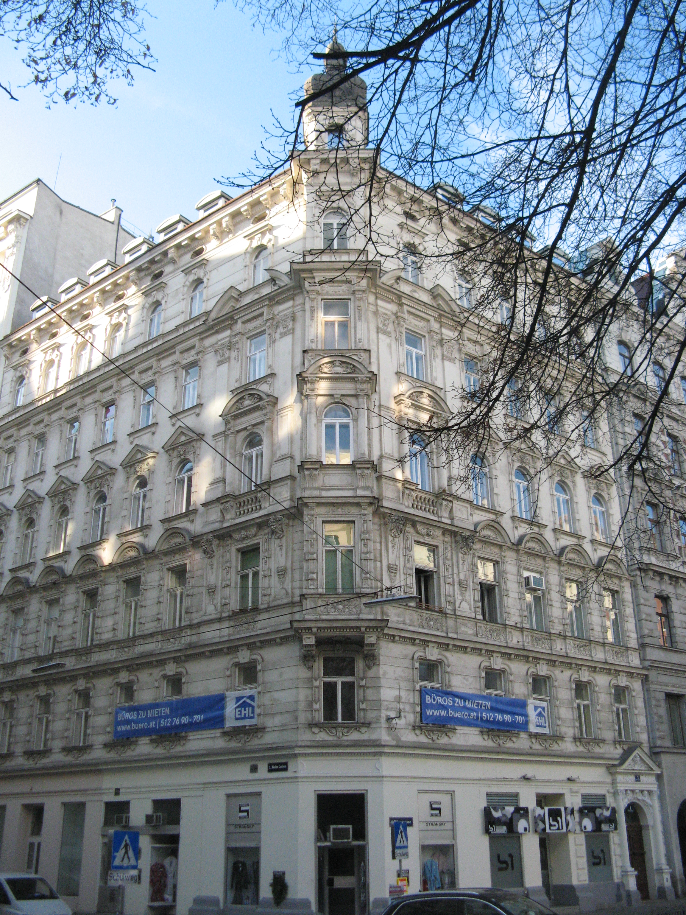 Haus Börsegasse Nr. 1 (1892) von Hugo Steiner, Wien-Innere Stadt